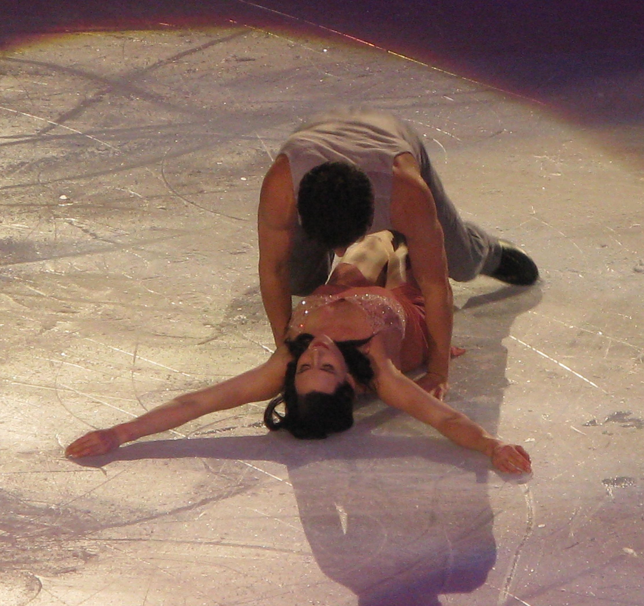 Tessa Virtue et Scott Moir lors du gala du trophée Éric Bompard 2013 à Paris-Bercy.